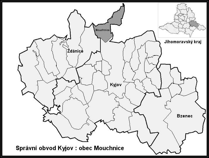 Mapa správní_oblasti_Kyjov_-_obec_Mouchnice